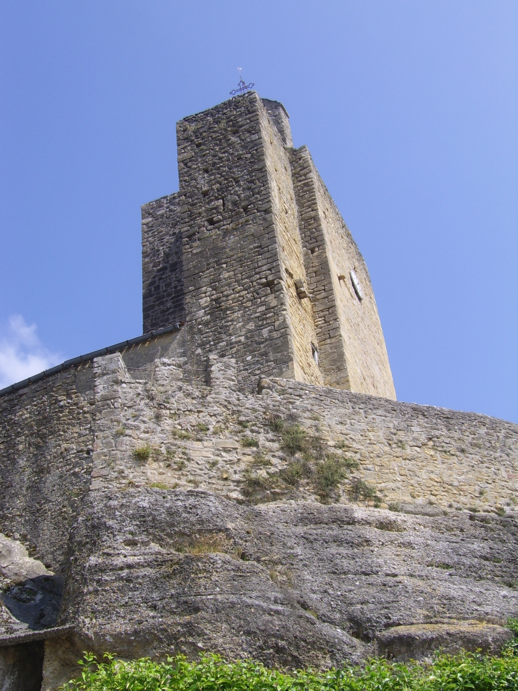 Eglise de Vals (Ariège, France)